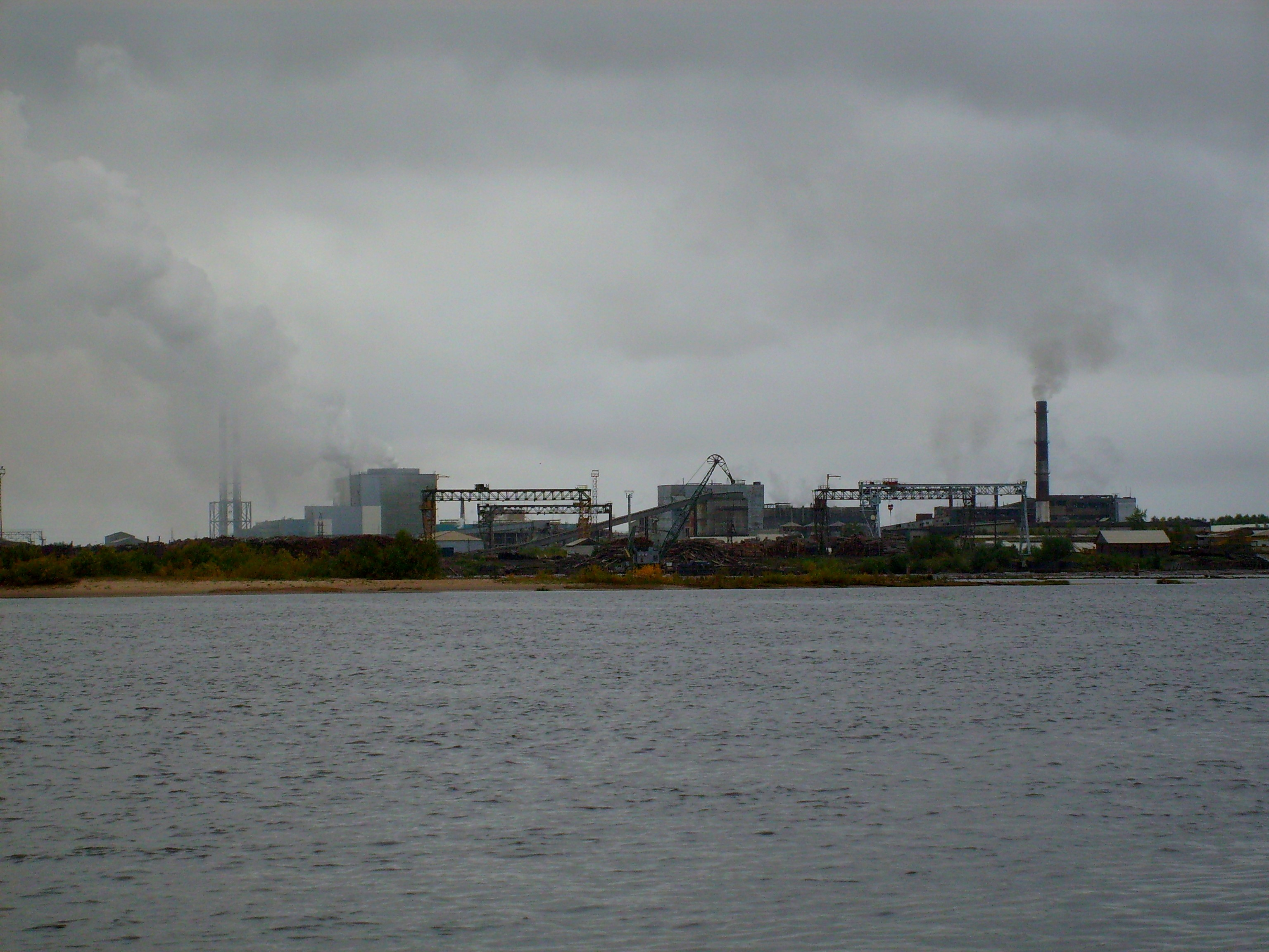 Соломбальский целлюлозно-бумажный комбинат, вид с берега Кузнечихи, г. Архангельск